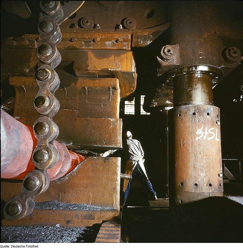 Original image description from the Deutsche Fotothek Metallurge für Walzwerktechnik